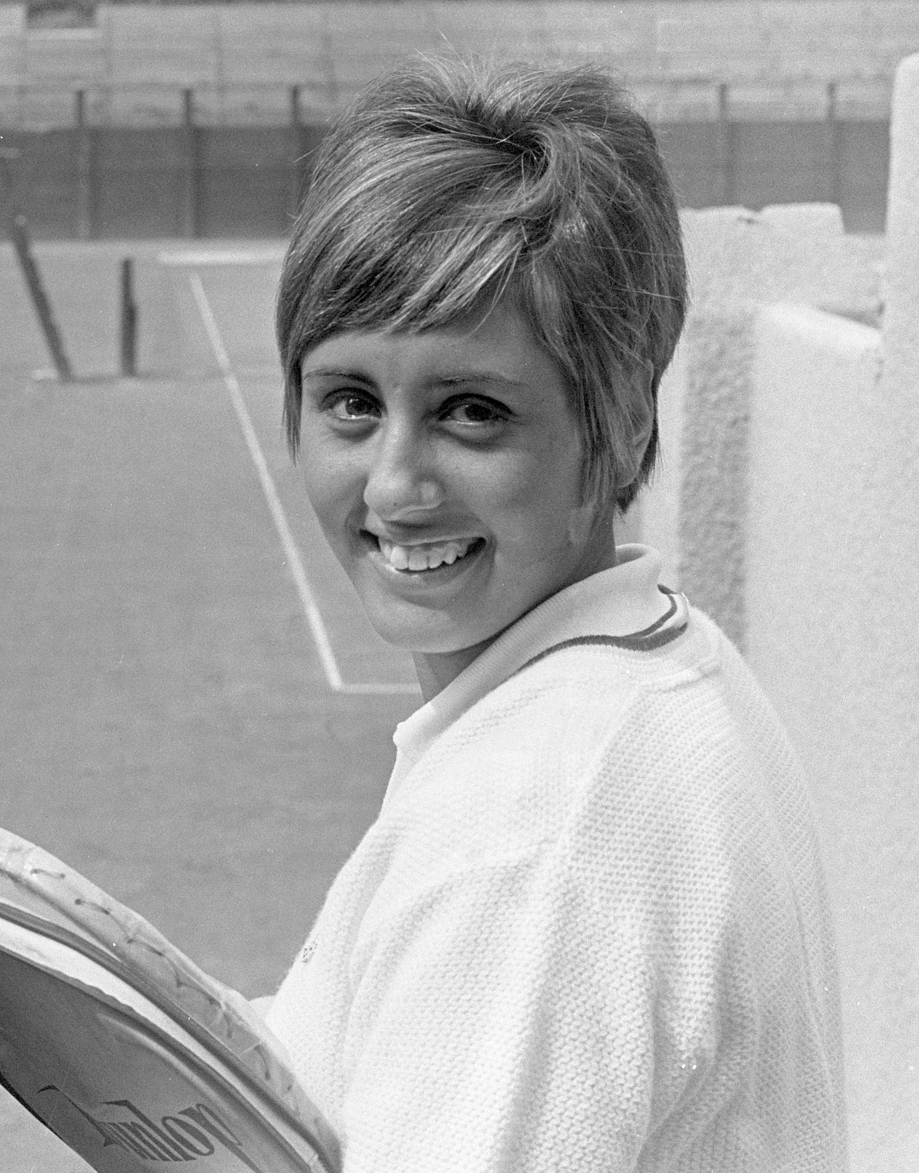 Nationale Tenniskampioenschappen te Scheveningen. Nummer 7 Astrid Suurbeek (voorgrond) en mevrouw N. Verschuren